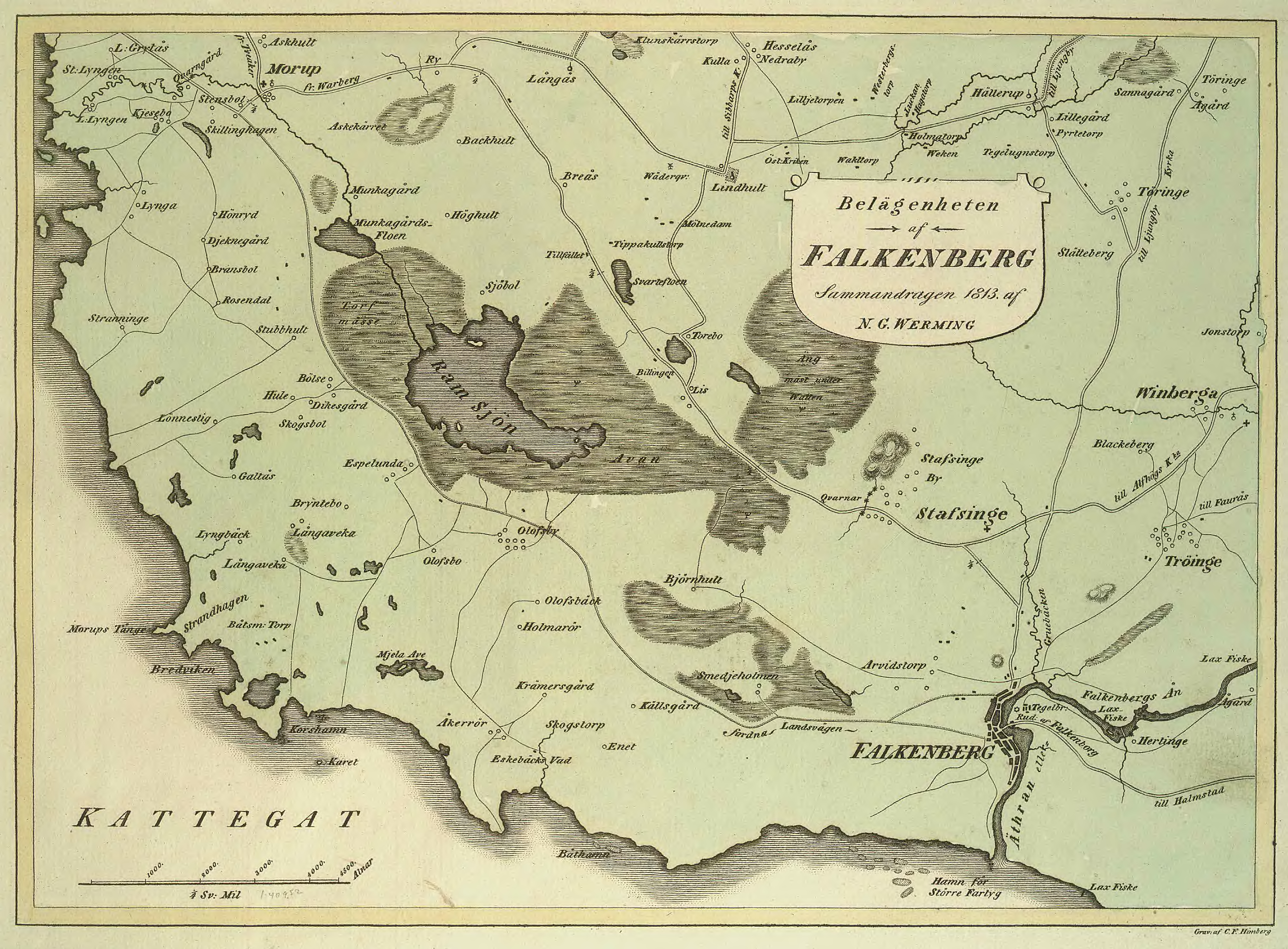 Karta över Falkenberg från 1813 av NG Werming.